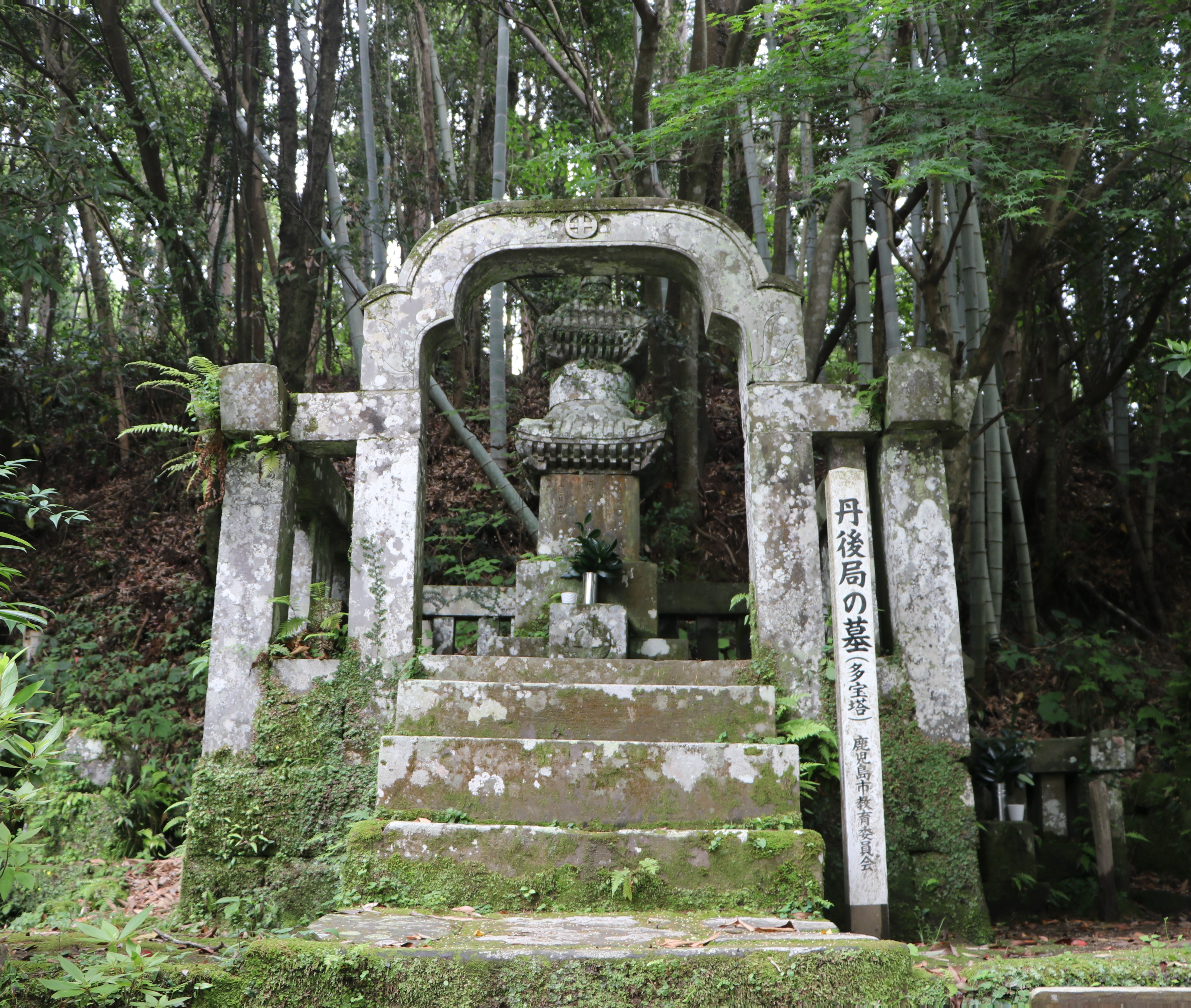 丹後内侍の墓。